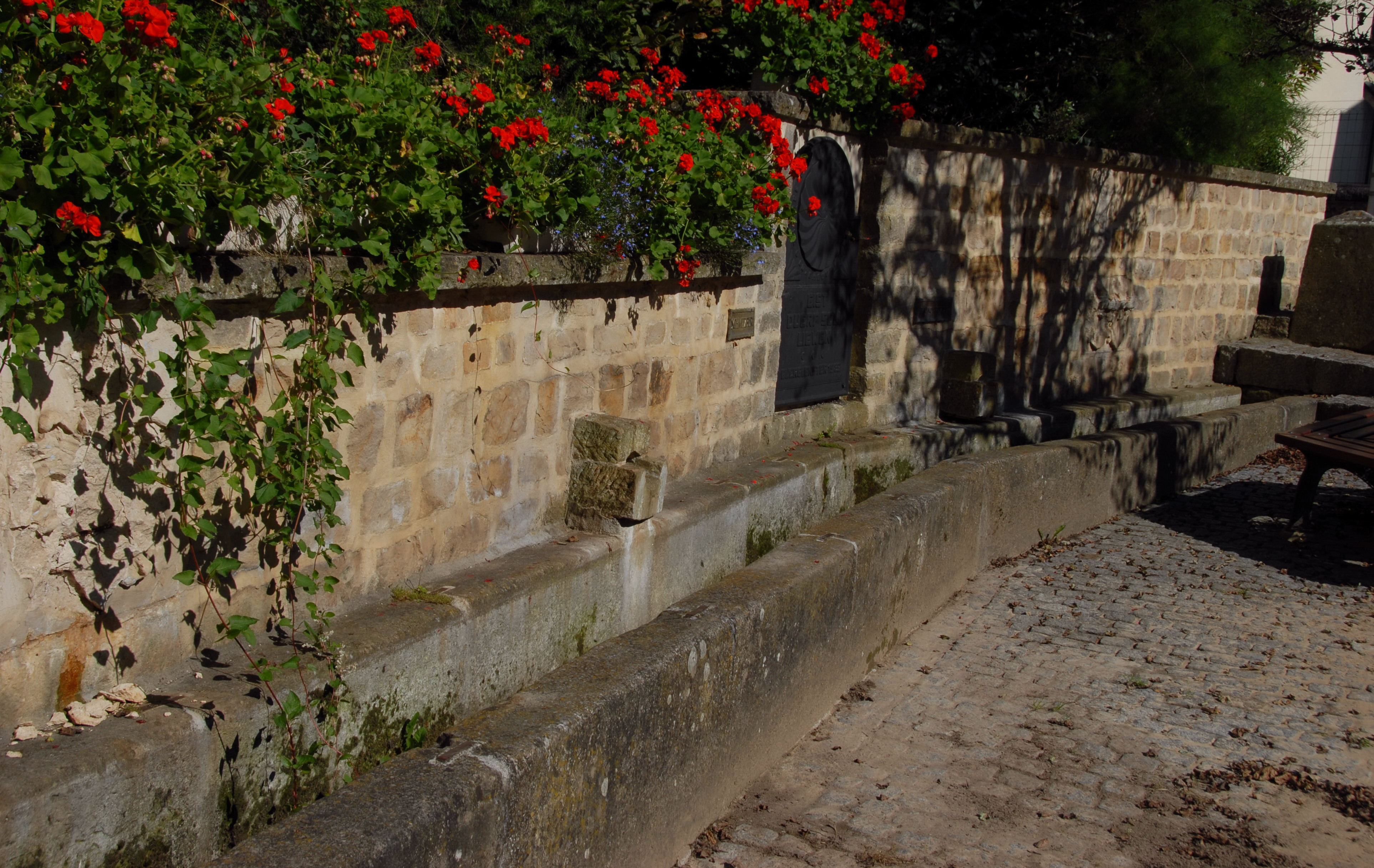 De Schmitzbuer zu Buerglënster. Kategorie:Gemeng Jonglënster